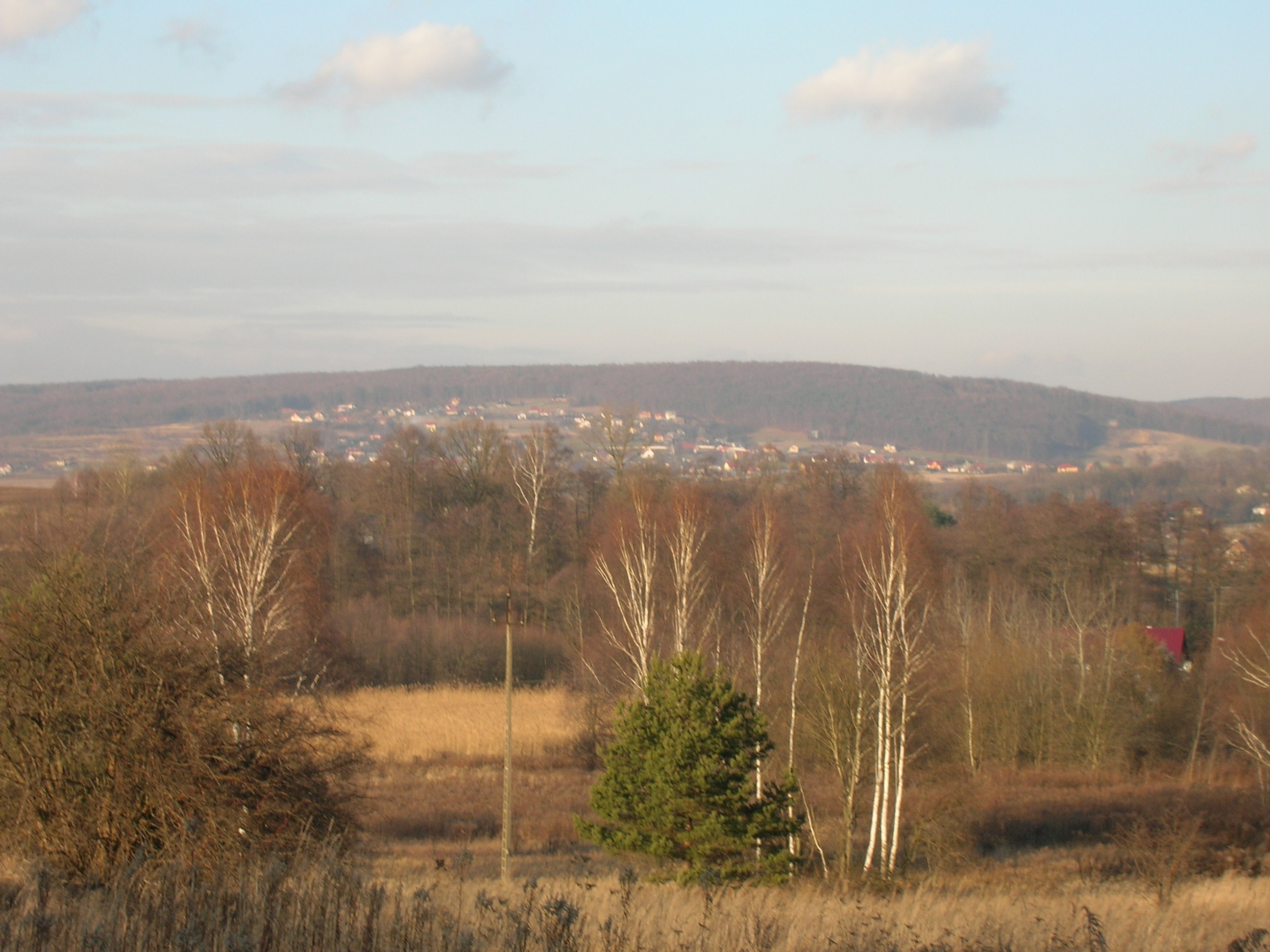 Dolina Borowcowa.Młynka